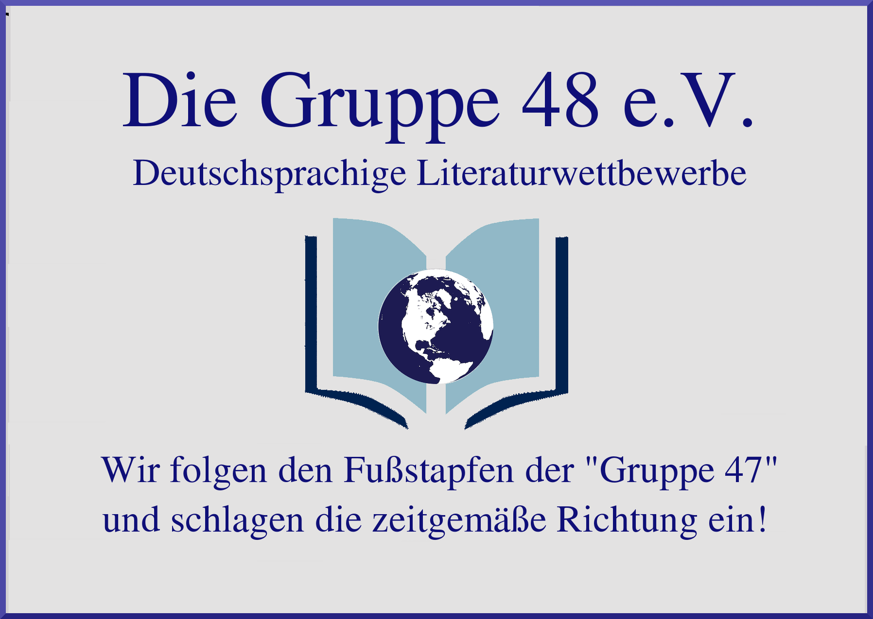 Die Bilddatei enthält das auf der Mitgliederversammlung der Gruppe 48 e.V. beschlossene neue Logo der Gruppe 48. Weitere Angaben s. "Quelle" u. "Urheber"